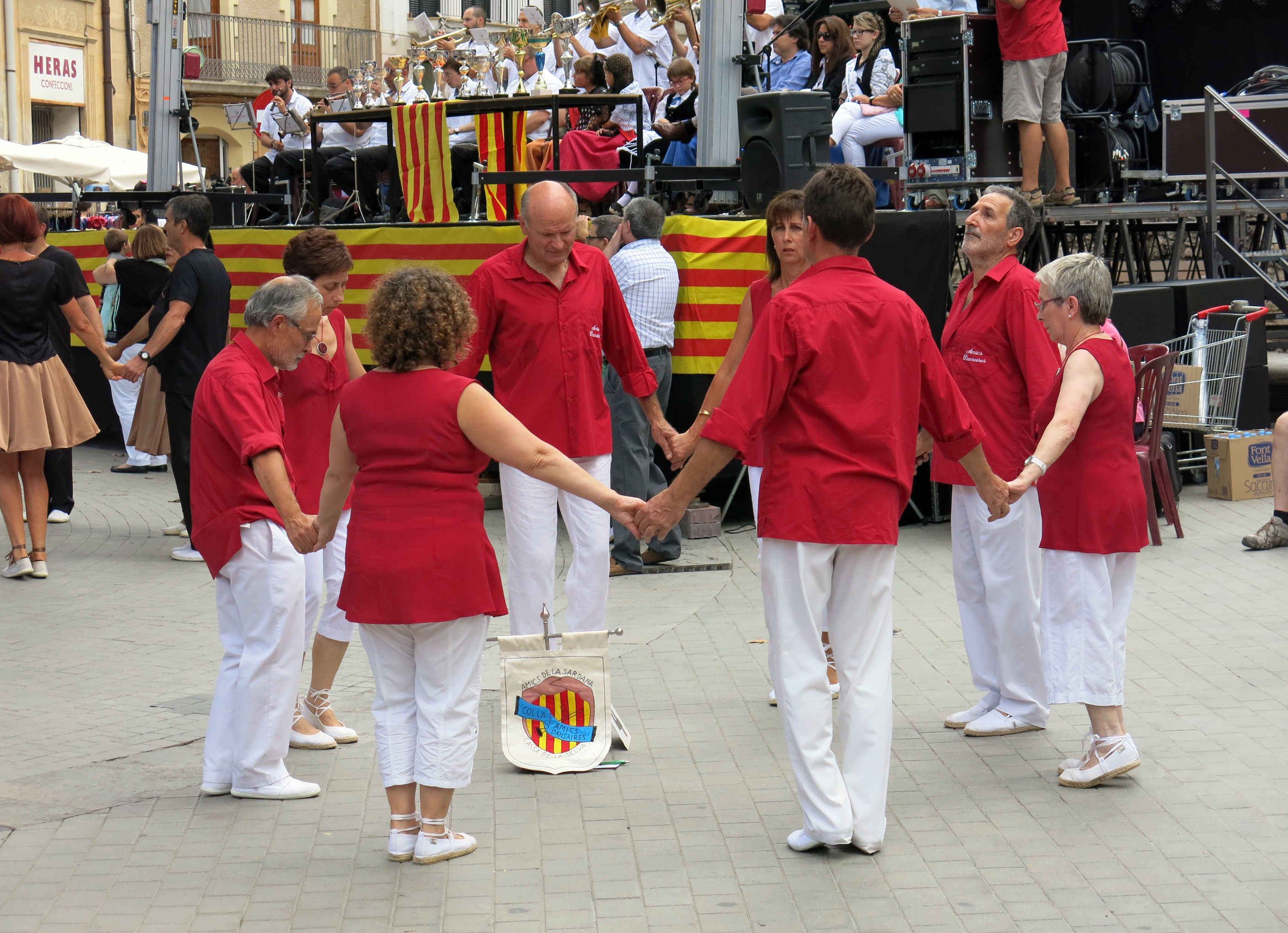 Sardanes a la plaça Major (Llançà)